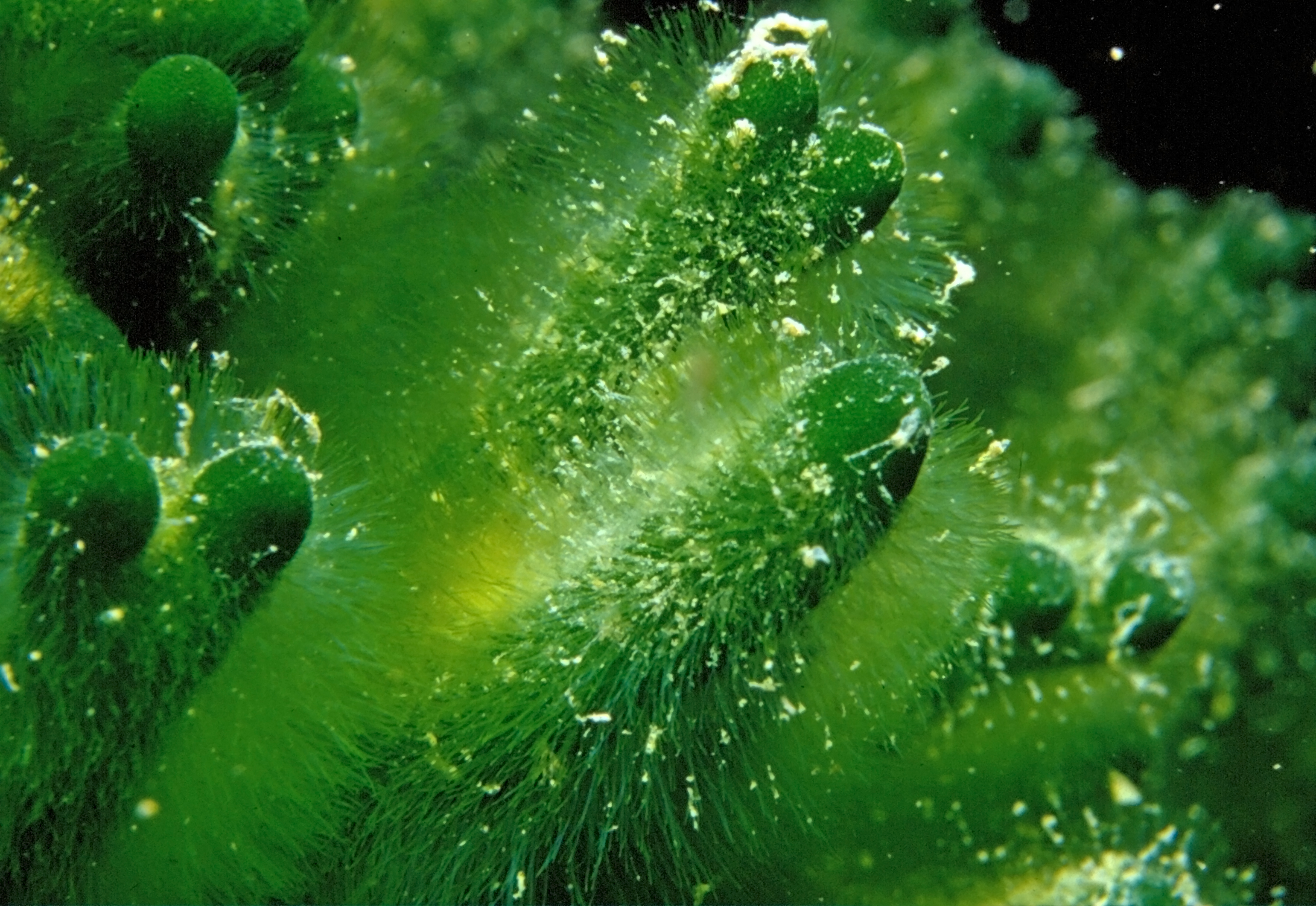 Codium fragile (Suringar) Hariot, 1889 - Banyuls-sur-Mer : 08/84